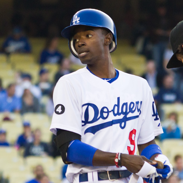 Dee Gordon